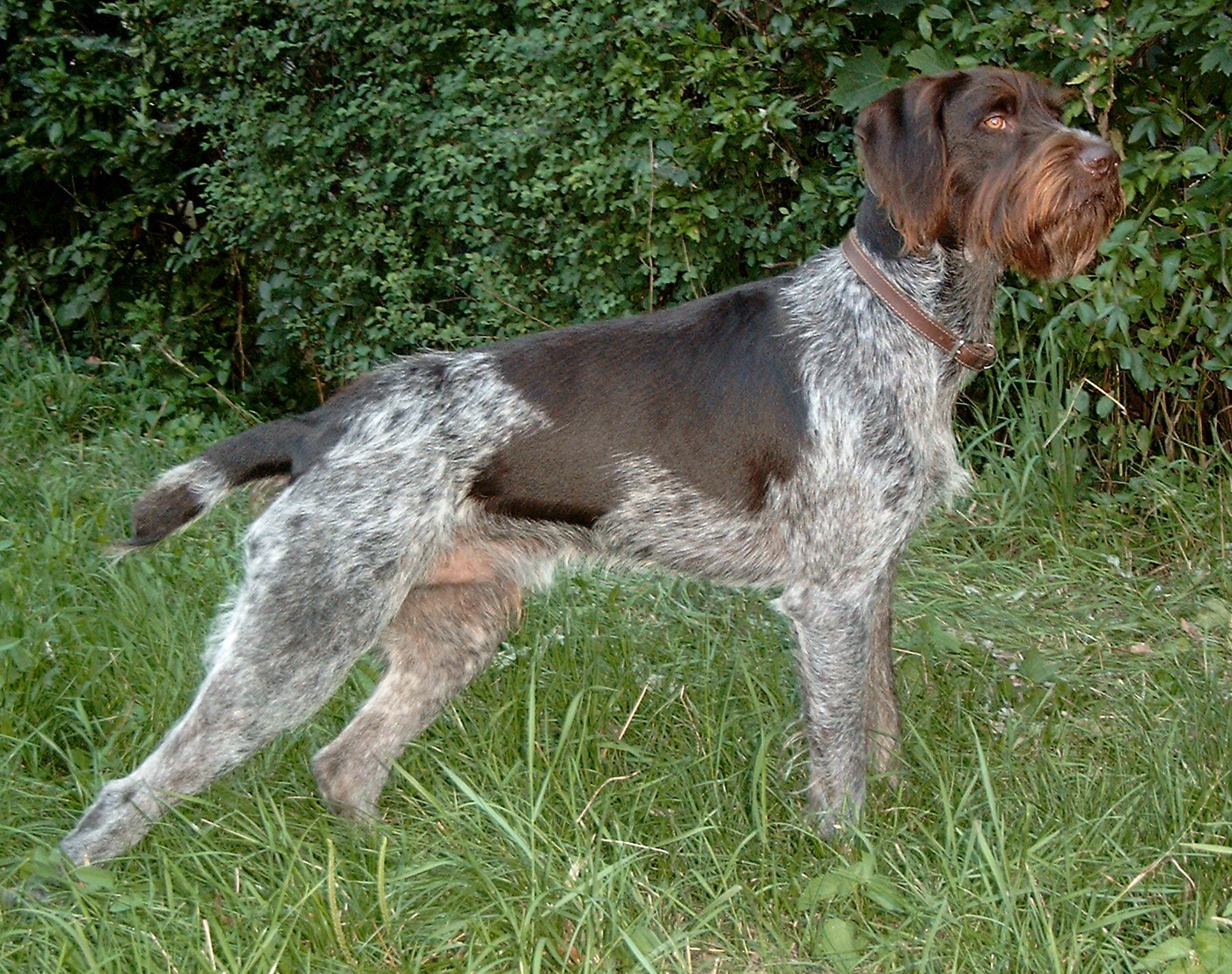 Fiatal drótszőrű német vizsla (Marosvásárhely)